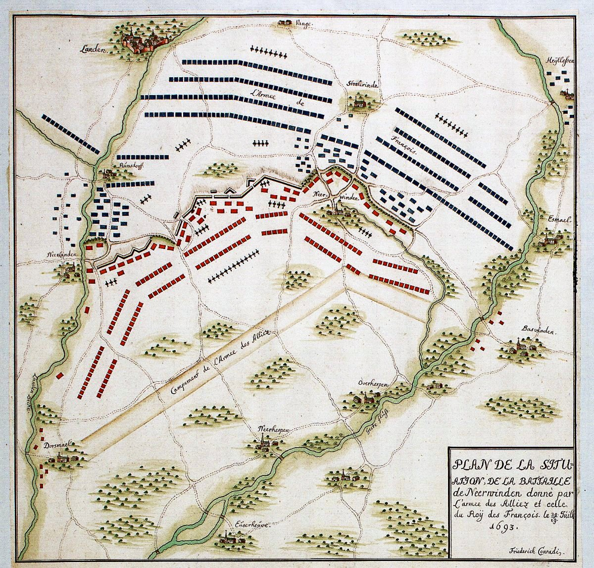 Karte der Schlacht von Neerwinden und Landen vom 29.7.1693. Originaltitel: Plan de la Situation de la Battaille de Neerwinden donné par l'Armee des Alliez et celle du Roy des Francois le 29./19. Juil. 1693 (Handzeichnung, koloriert)